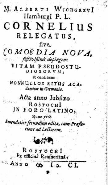 Titelblatt der zweiten Auflage des Theaterstücks Cornelius Relegatus von Albert Wichgreve von 1601